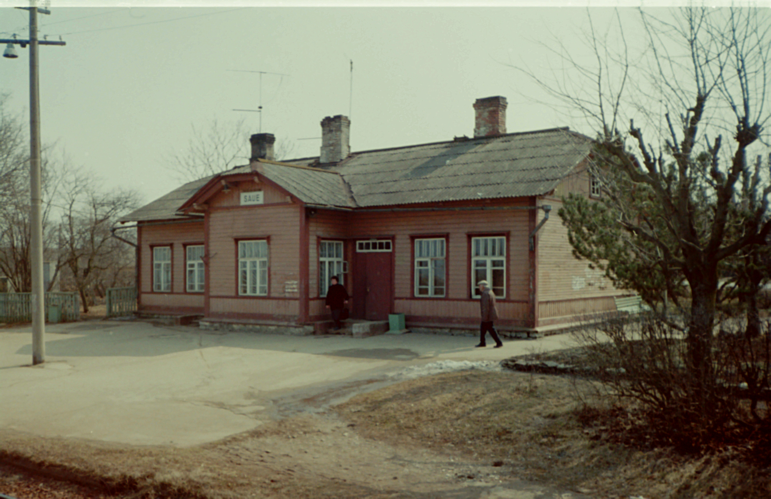 Saue jaamahoone (lammutatud)